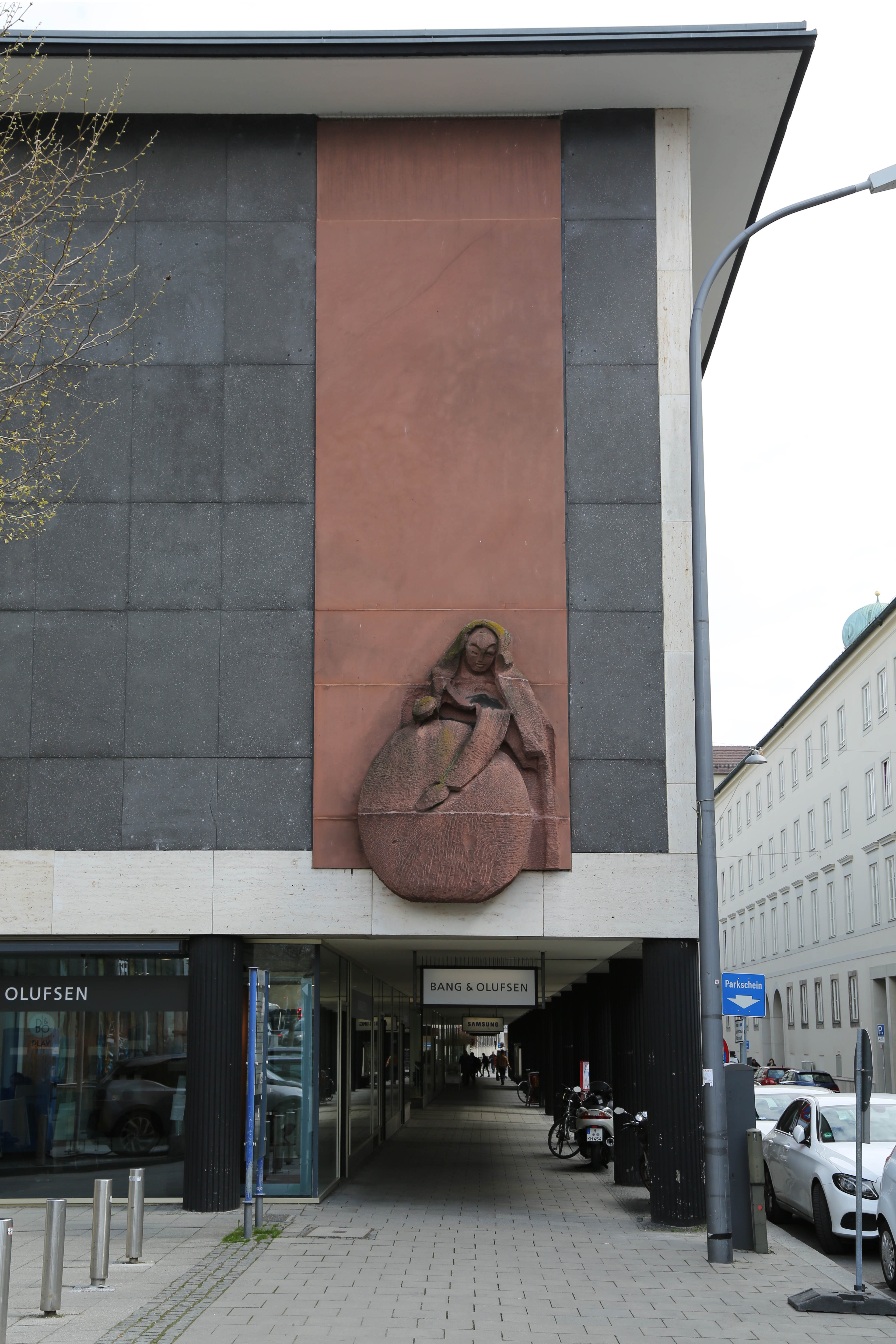 Maxburg, München